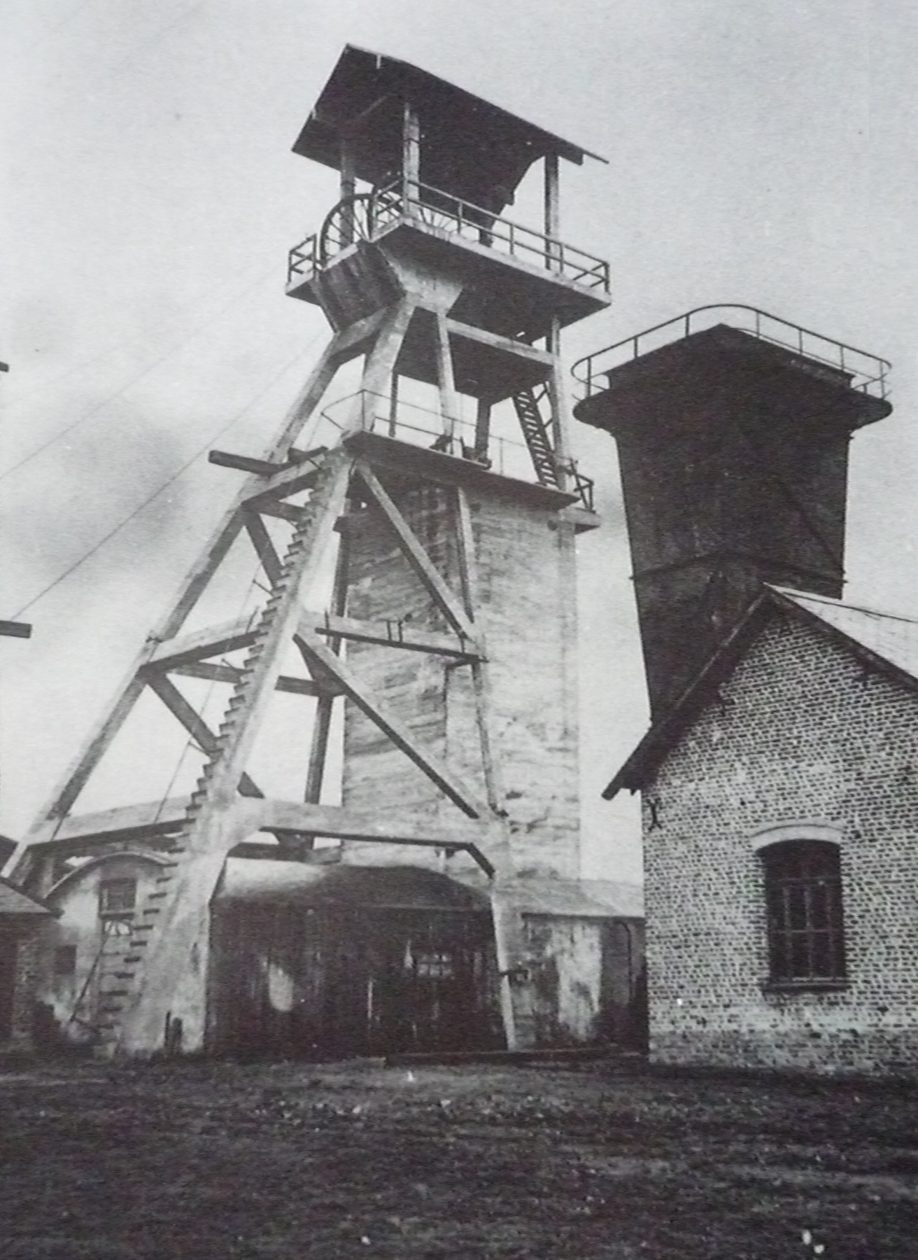 La Fosse n° 1 - 1 bis de la Compagnie des mines de Gouy-Servins et Fresnicourt Réunis était un charbonnage constitué de deux puits situé à Bouvigny-Boyeffles, Pas-de-Calais, Nord-Pas-de-Calais, France. Le chevalement est celui du puits n° 1 bis.